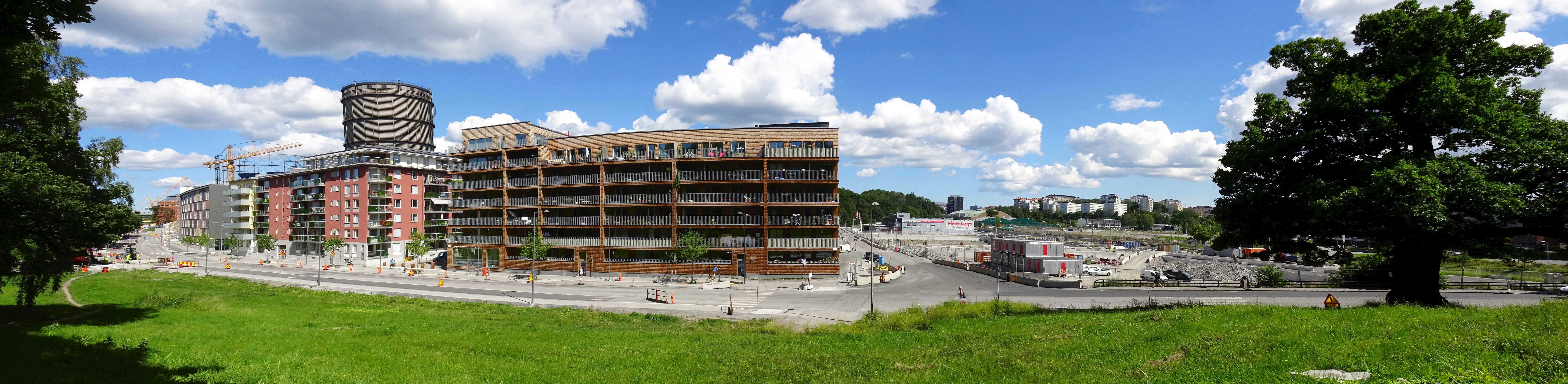 Panorama över Norra Djurgårdsstaden från Fiskartorpsvägen